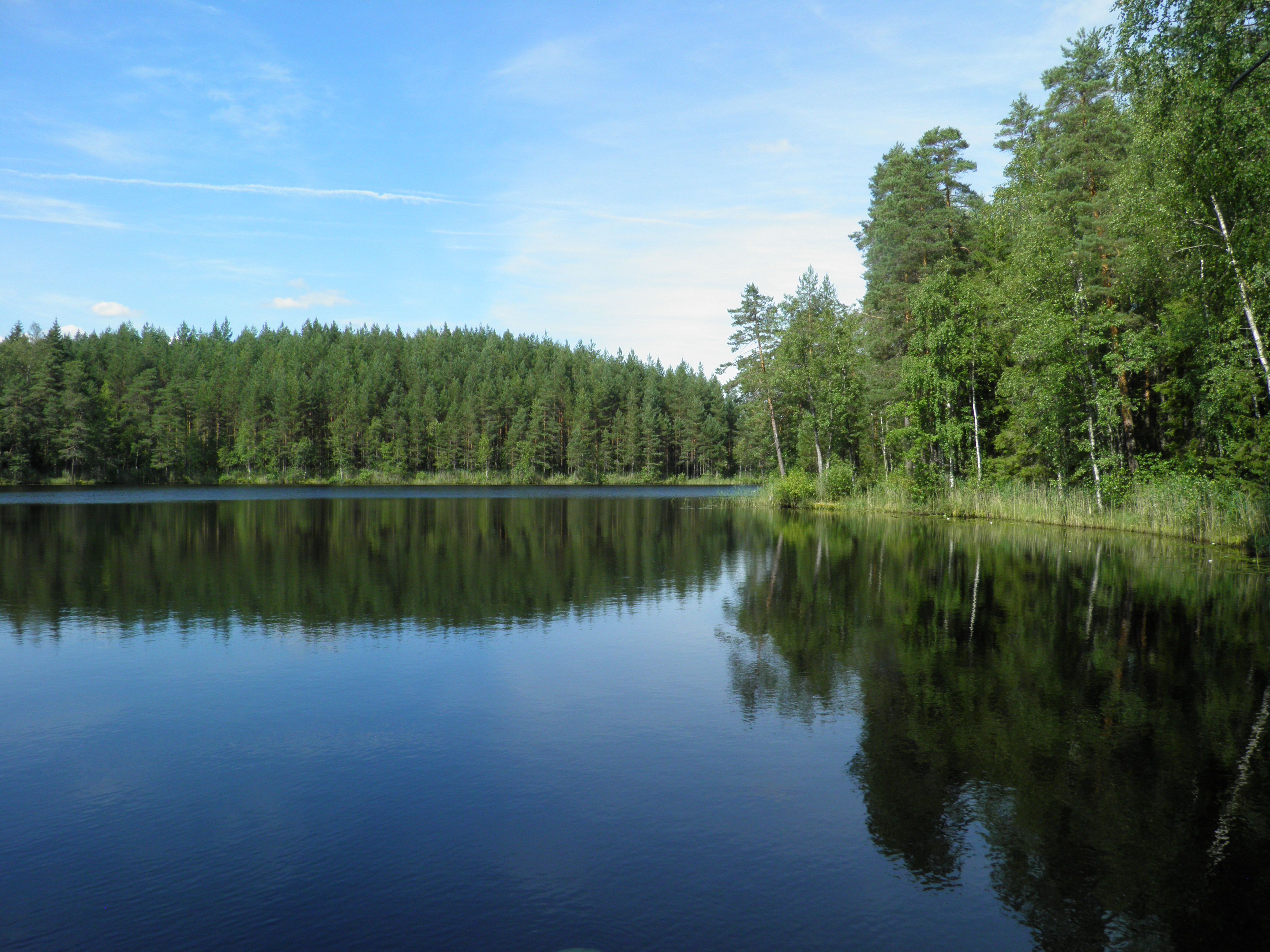 Keskinen Niemisjärvi Hämeenlinnan Evolla kaakosta nähtynä.